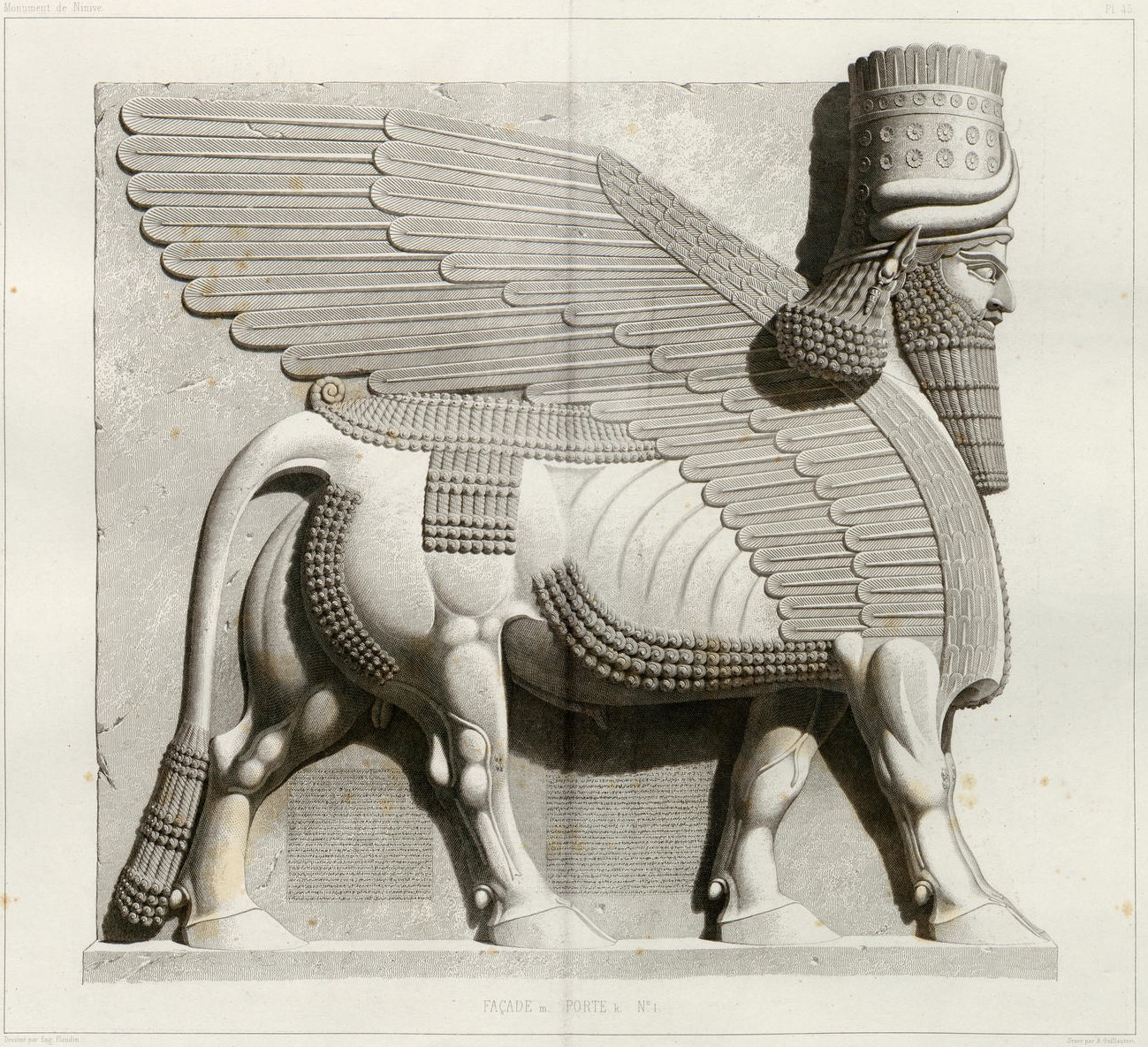 Stier in Fassade m, Tür k, Nr. 1 Palast Sargon II in Dur Scharrukin – Zeichnung Flandin Pl 45